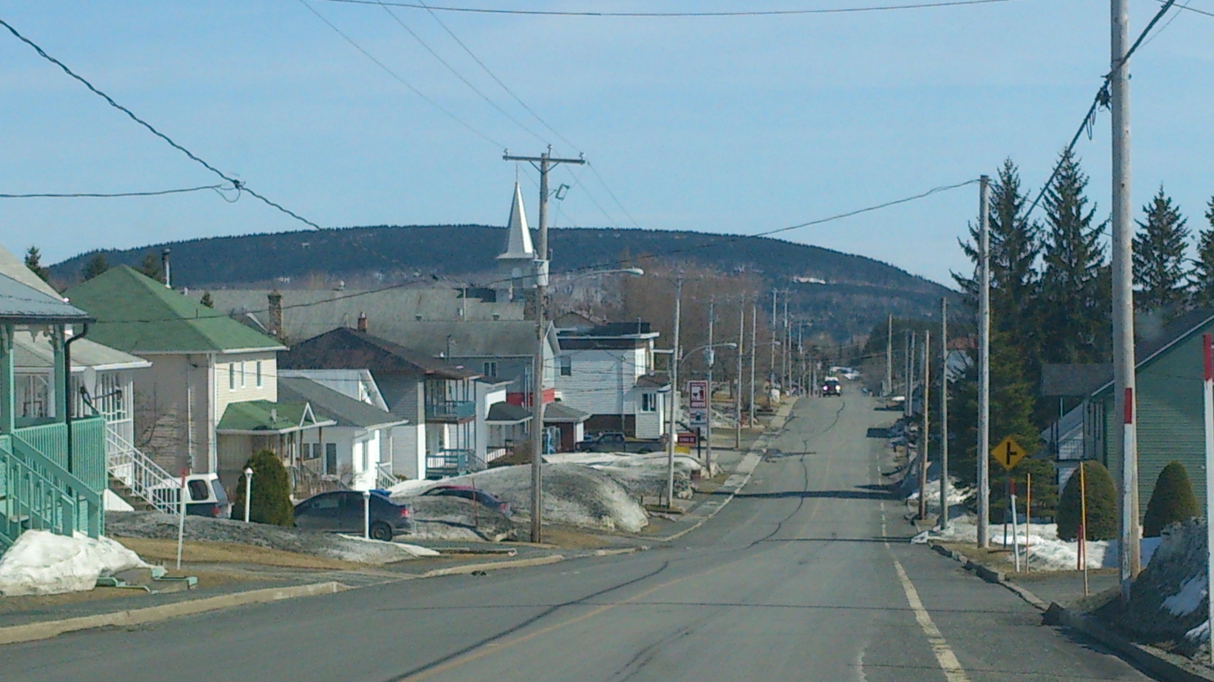 Rue Principale, Saint-Luc-de-Bellechasse